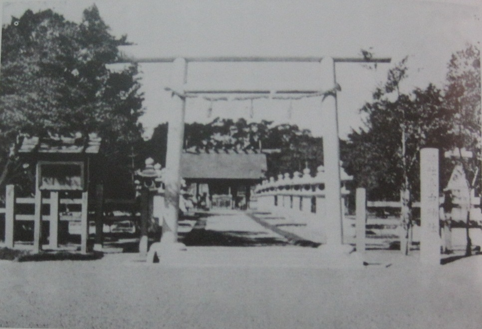 第一代的臺中神社